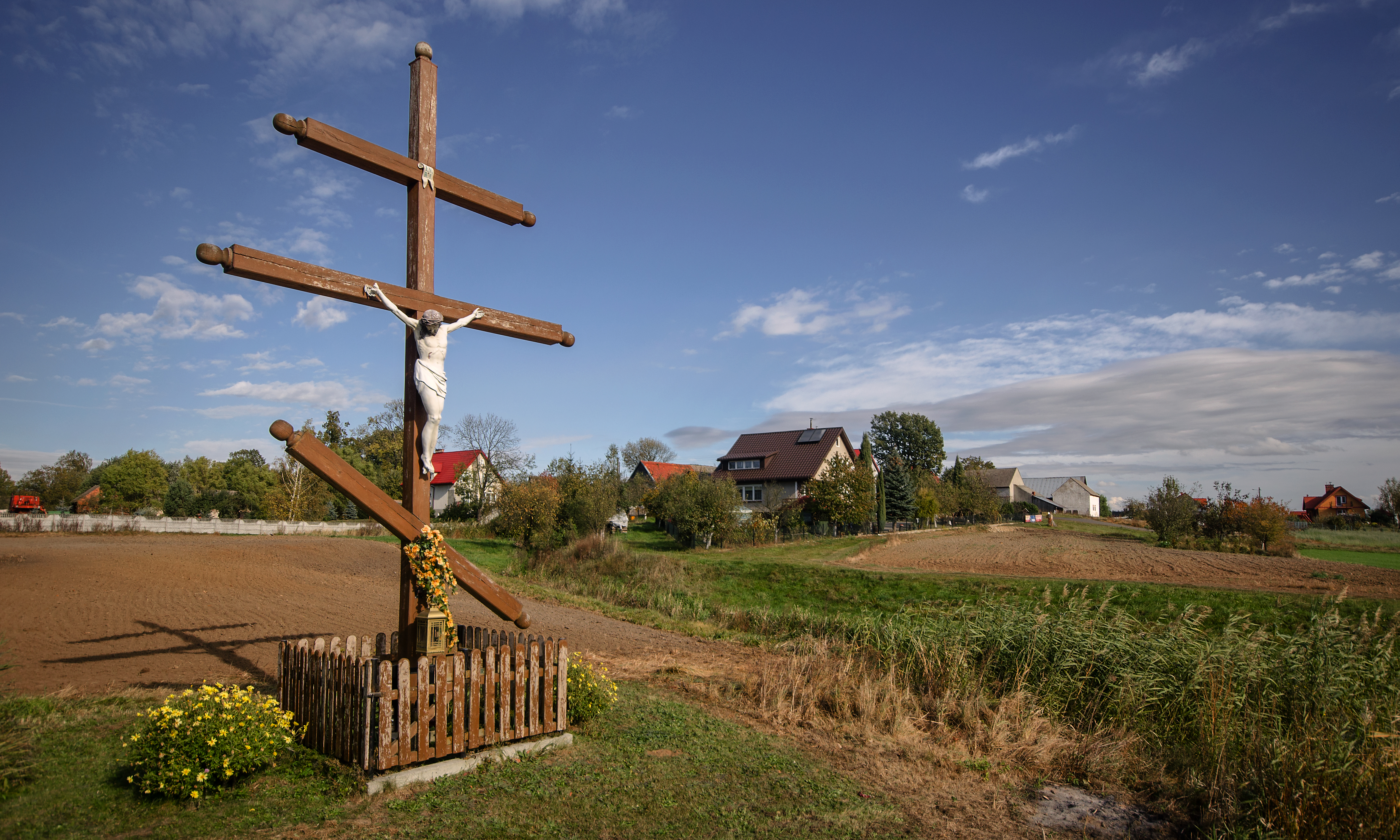 Lisiec, wieś w gminie Lubin